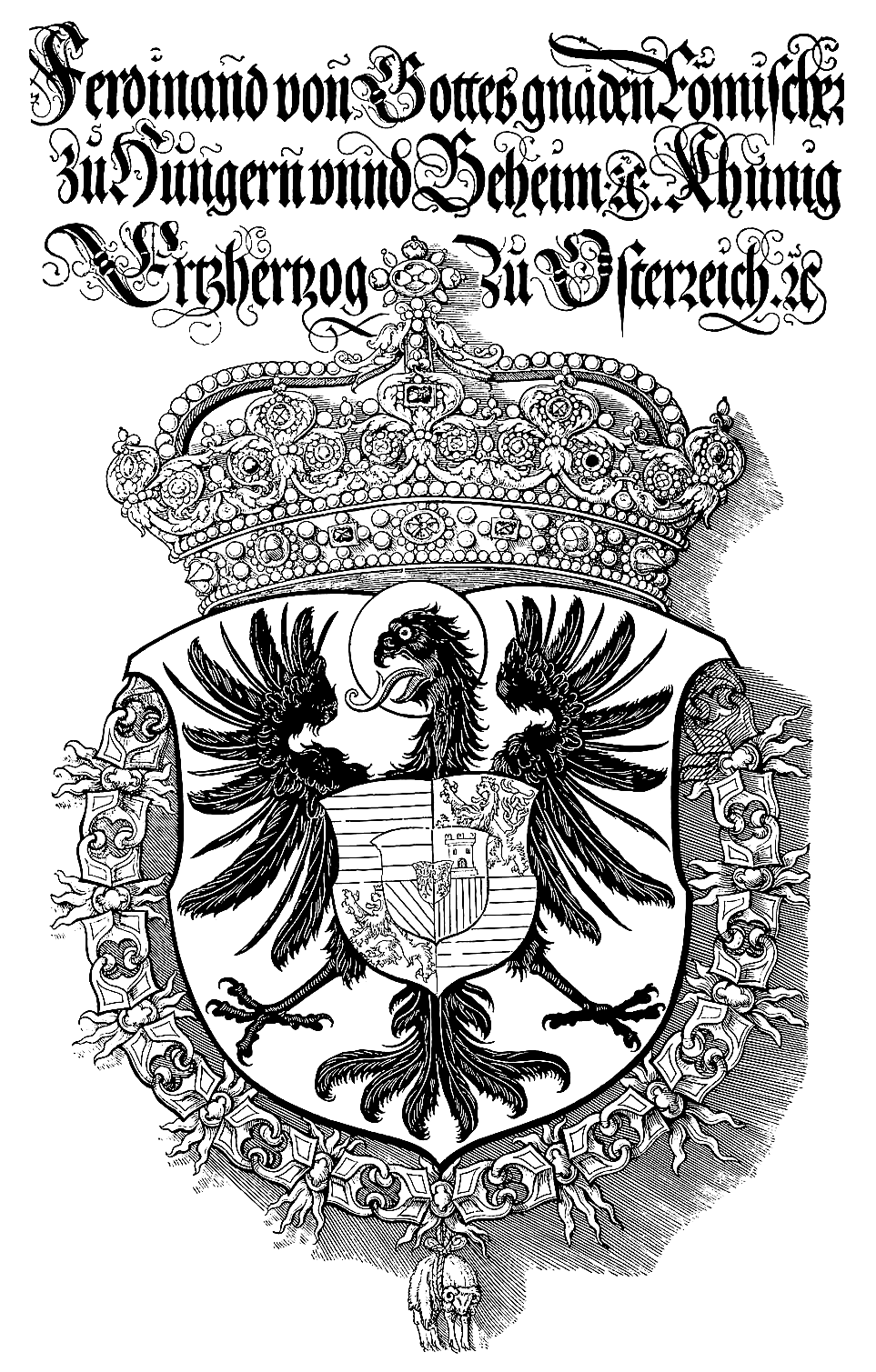 Unbekanntes Wappen. Maße: Height: 42.5 cm (16.7 ″); Width: 31.2 cm (12.2 ″) dimensions QS:P2048,42.5U174728;P2049,31.2U174728, Technik: woodcut